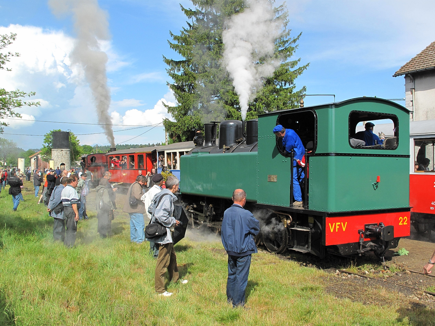 Affluence inhabituelle en gare de Raucoules-Brossettes (Haute-Loire), à l'occasion du festival vapeur des voies ferrées du Velay le 21 mai 2011.